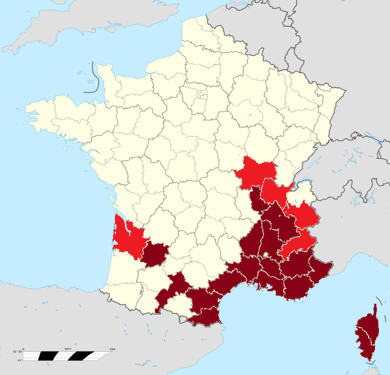 Carte montrant les départements français essuyant une importante présence et actvité du moustique Aedes albopictus en 2013. Implantation et activité importante Régulièrement signalé